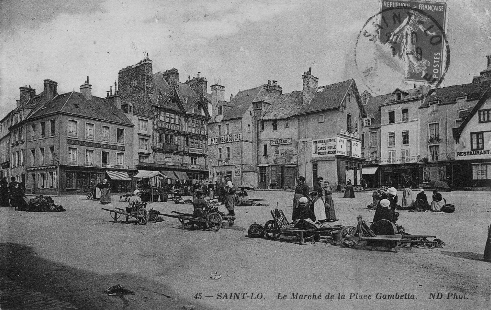 Carte postale du début du XXe siècle avec en photo la place Gambetta à Saint-Lô un jour de marché.